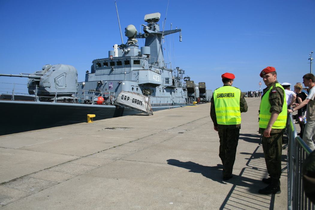 Żandarmi podczas Juwenalii 2008